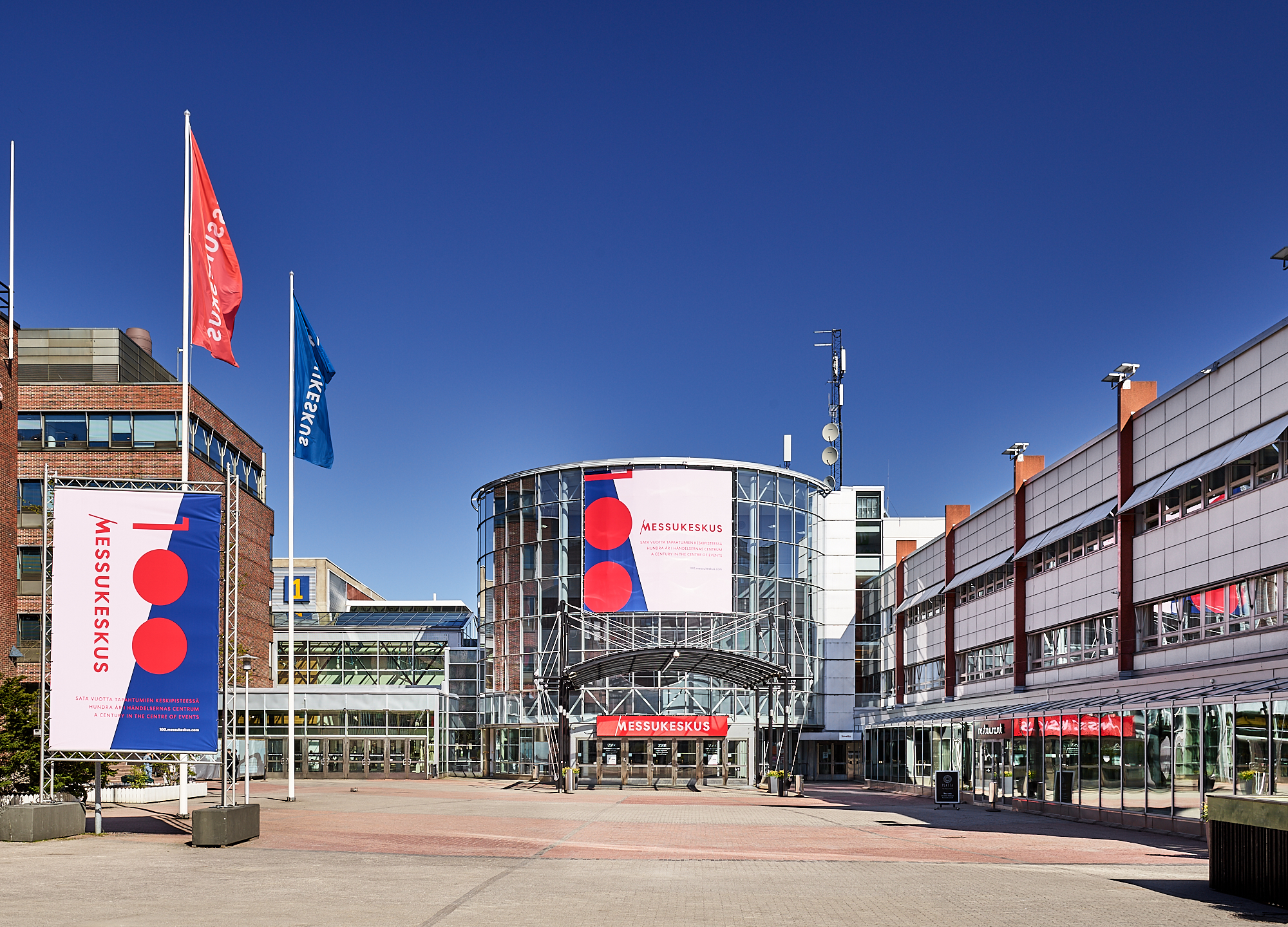 Messukeskuksen aukio ja eteläinen sisäänkäynti